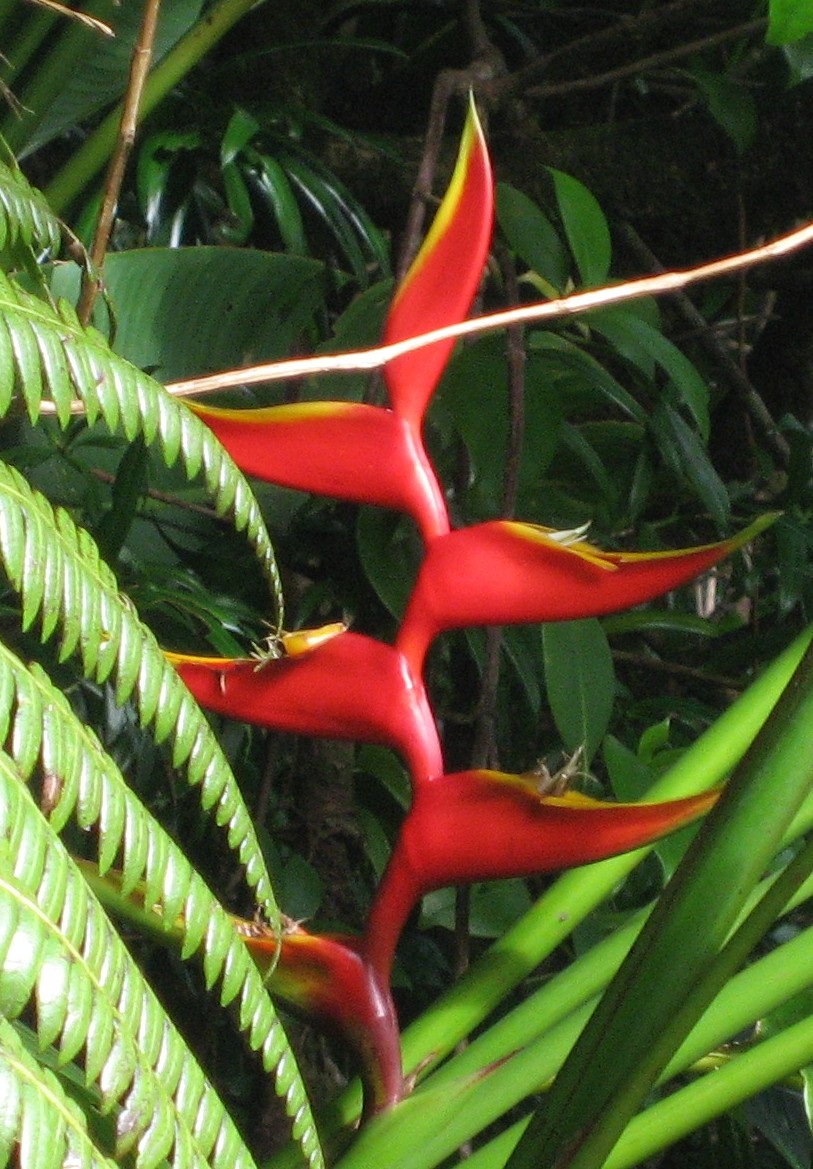 Heliconia wagneriana Heliconia bihai au Parc des Mamelles en Guadeloupe, Basse-Terre